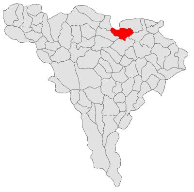 Categorie:Hărţi ale judeţului Alba